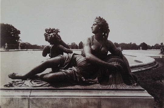 Photographie noir et blanc d'Eugène Atget représentant la sculpture Le Loiret de Thomas Regnaudin (1622-1706), bronze fondé par les frères Keller et placé sur la margelle orientale du Bassin du Midi du Parterre d'Eau dans les jardins du Parc de Versailles.